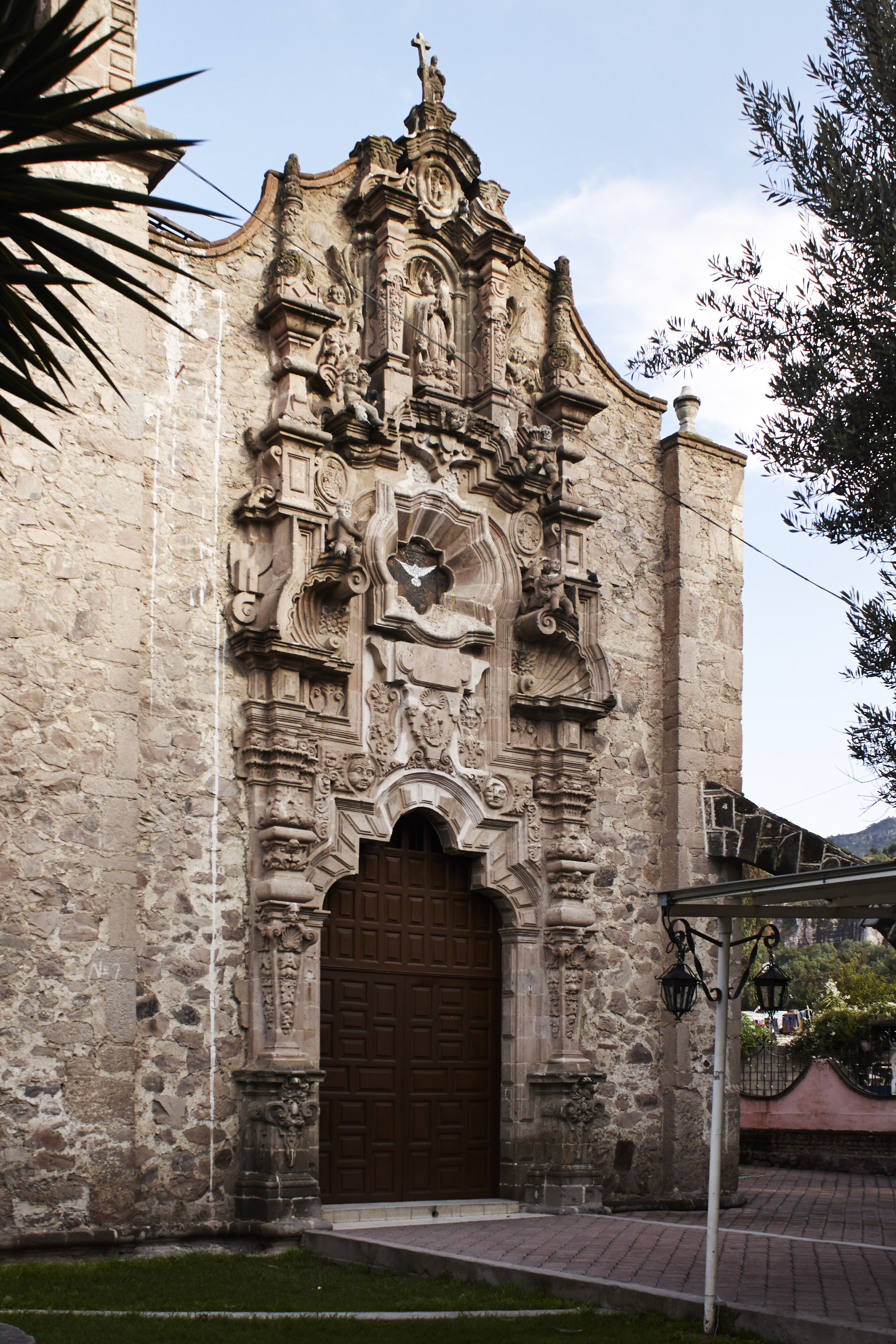 Un dato importante sobre la capilla de Santa Maria Cuautepec, dedicada a la virgen Maria en su advocación de Nuestra Señora de la Candelaria, es que, aunque es la más pequeña del minicipio al igual que el pueblo, tiene la fachada ( estilo Barroco) mejor elaborada de todas las iglesias de Tultitlan. Esto se puede deber a que en las cercanías del pueblo existía la hacienda de La Mariscala y la fachada pudo ser financiada por los dueños de dicha hacienda.